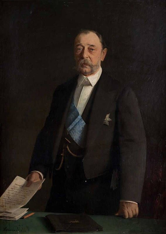 Портрет графа Д.А. Толстого, президента Императорской Академии наук. Холст, масло. 125,3 х 90,3. На изображении в левом нижнем углу подпись художника: «ИКрамской» И.Н. Крамской по заказу Академии наук выполнил с натуры портреты двух ее президентов – Ф.П. Литке (1871) и Д.А. Толстого (1884 ). Как отмечает Д.А. Ровинский, оба портрета с «высочайшего соизволения» были помещены в конференц-зале здания Императорской Академии наук в Петербурге (См.: Ровинский Д.А. Подробный словарь русских гравированных портретов. СПб., 1889. Т.4. Стб.257).